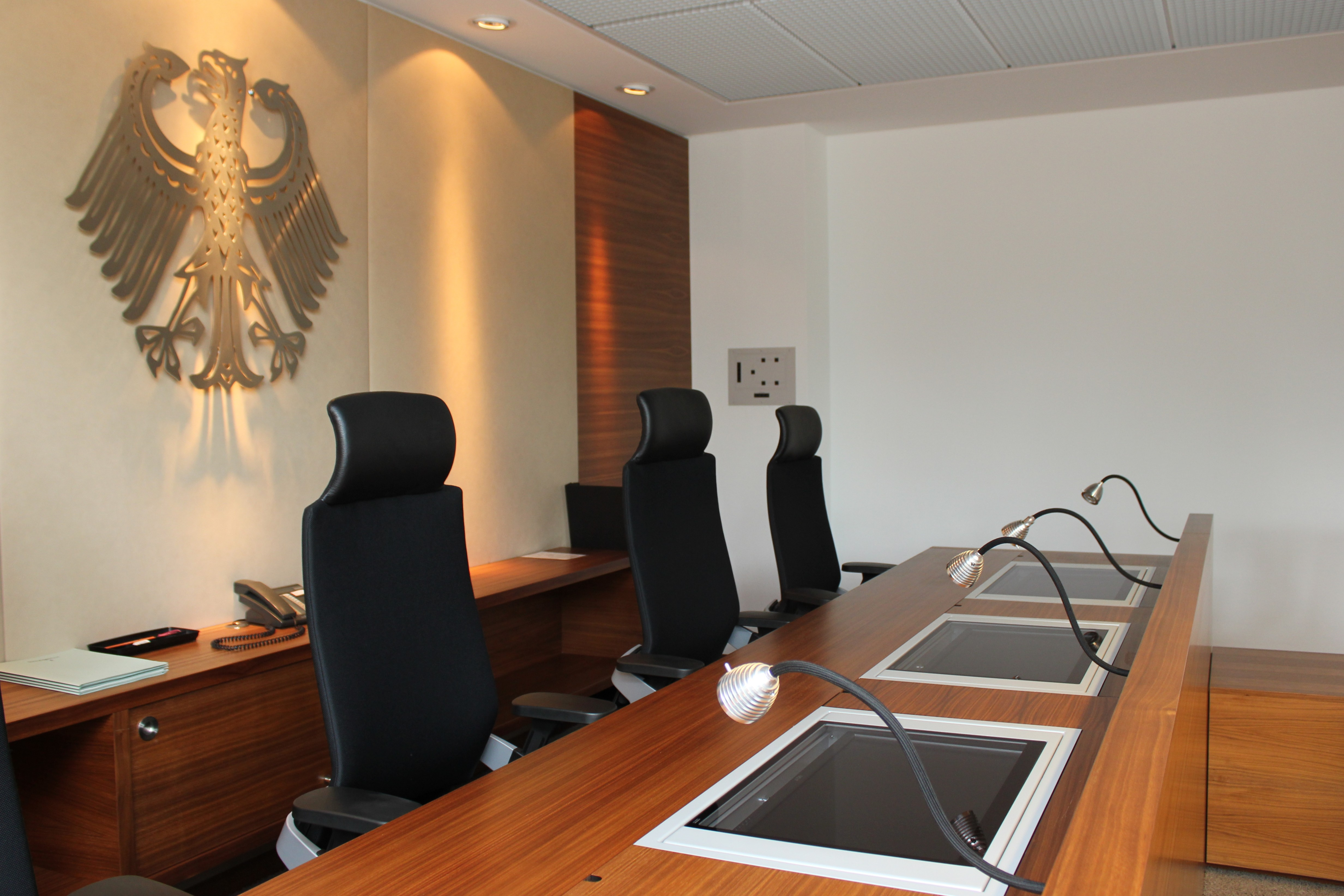 Das Bundespatentgericht in München. Fotografiert im Rahmen des Landtagsprojektes Bayern 2012. Wikipedia im Landtag – Bayern 17. bis 19. Juli 2012 in München Dieses Foto wurde im Rahmen des Projektes „Wikipedia im Landtag“ erstellt.